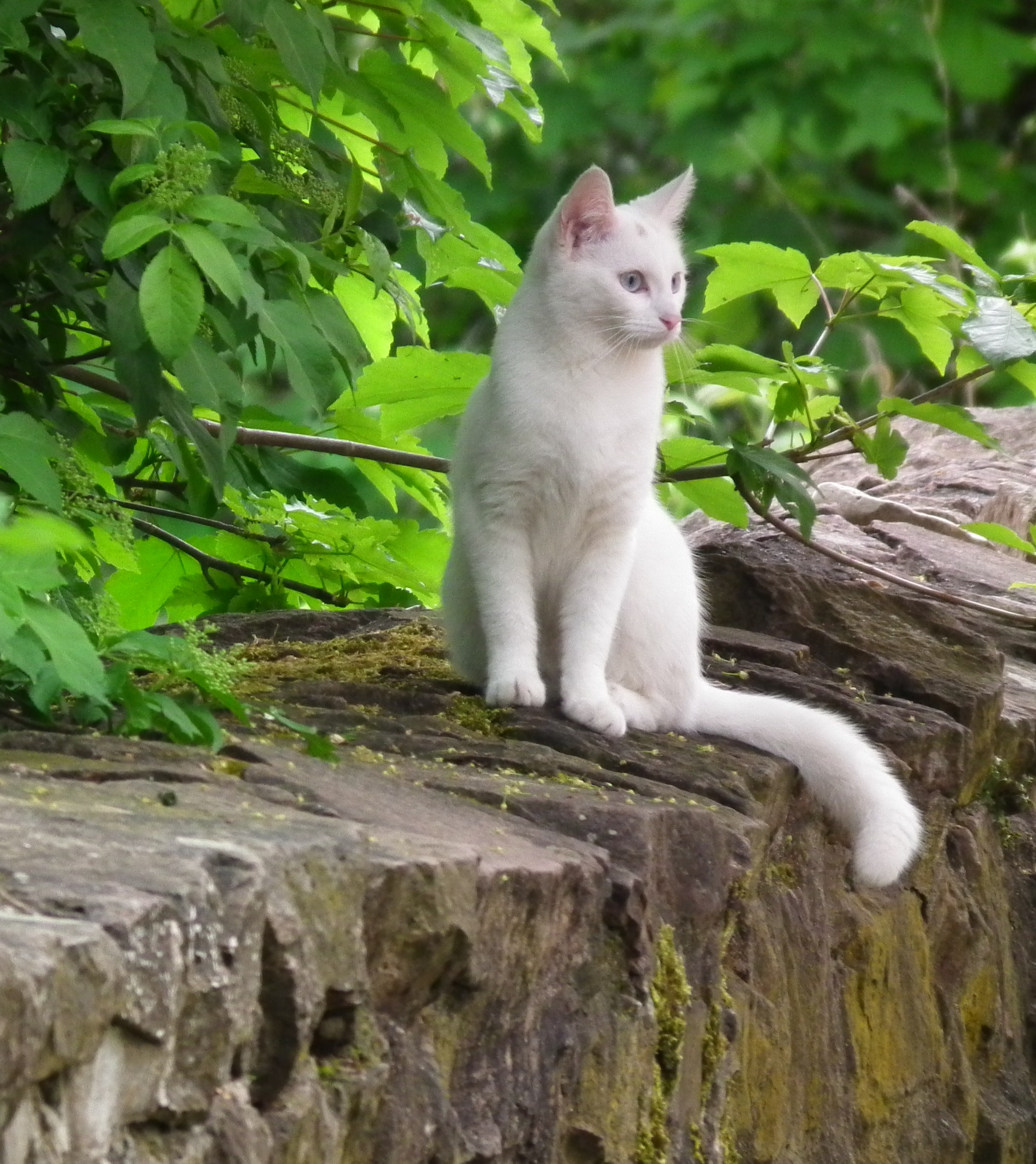 Jagende weiße Katze, fotografiert in Deutschland